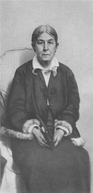 Vera Figner (1852-1942)